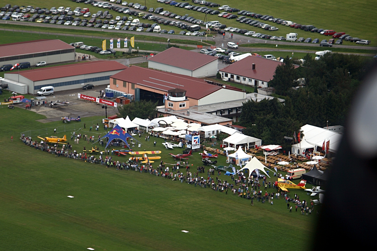 Tannkosh 2009